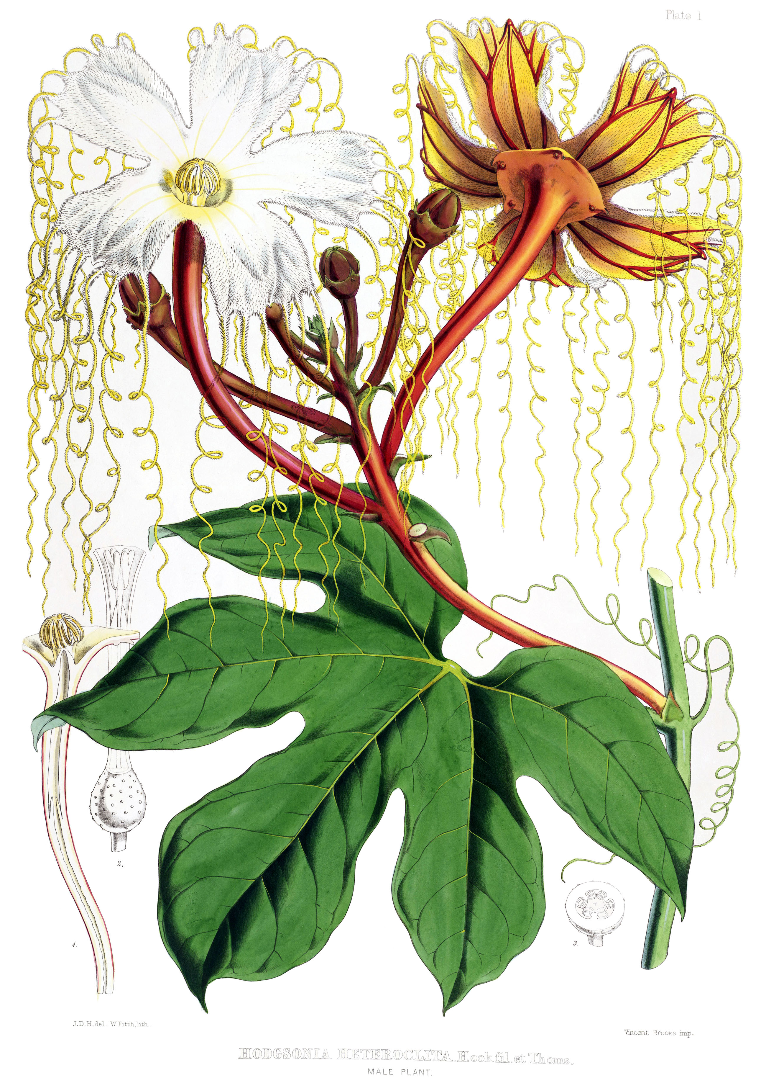 Hodgsonia heteroclita male plant